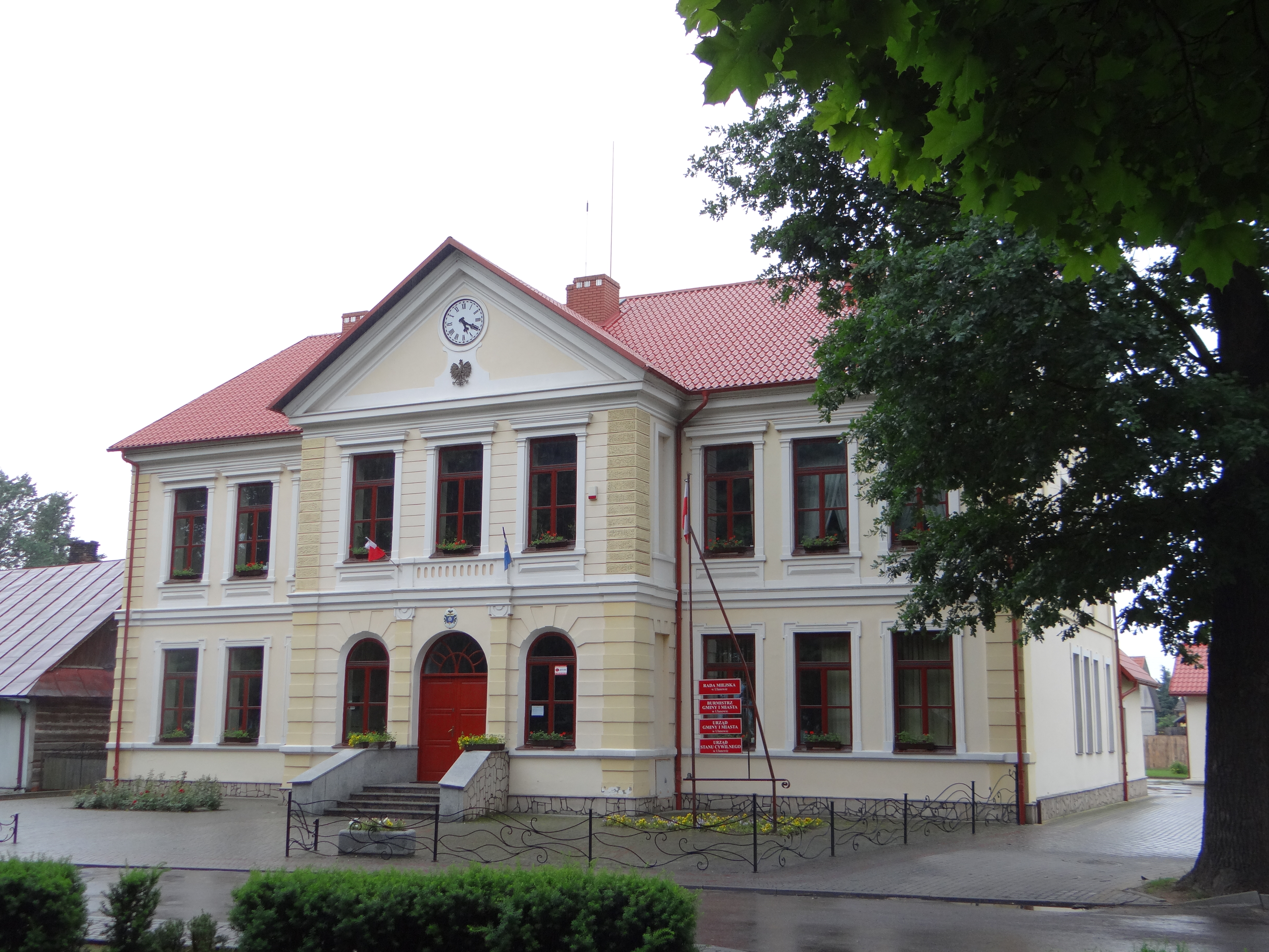 Zdjęcie wykonane w miejscowości Ulanów.